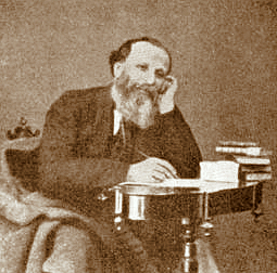 F. Dall'Ongaro Licensing Categoria:Immagini Poeti italiani